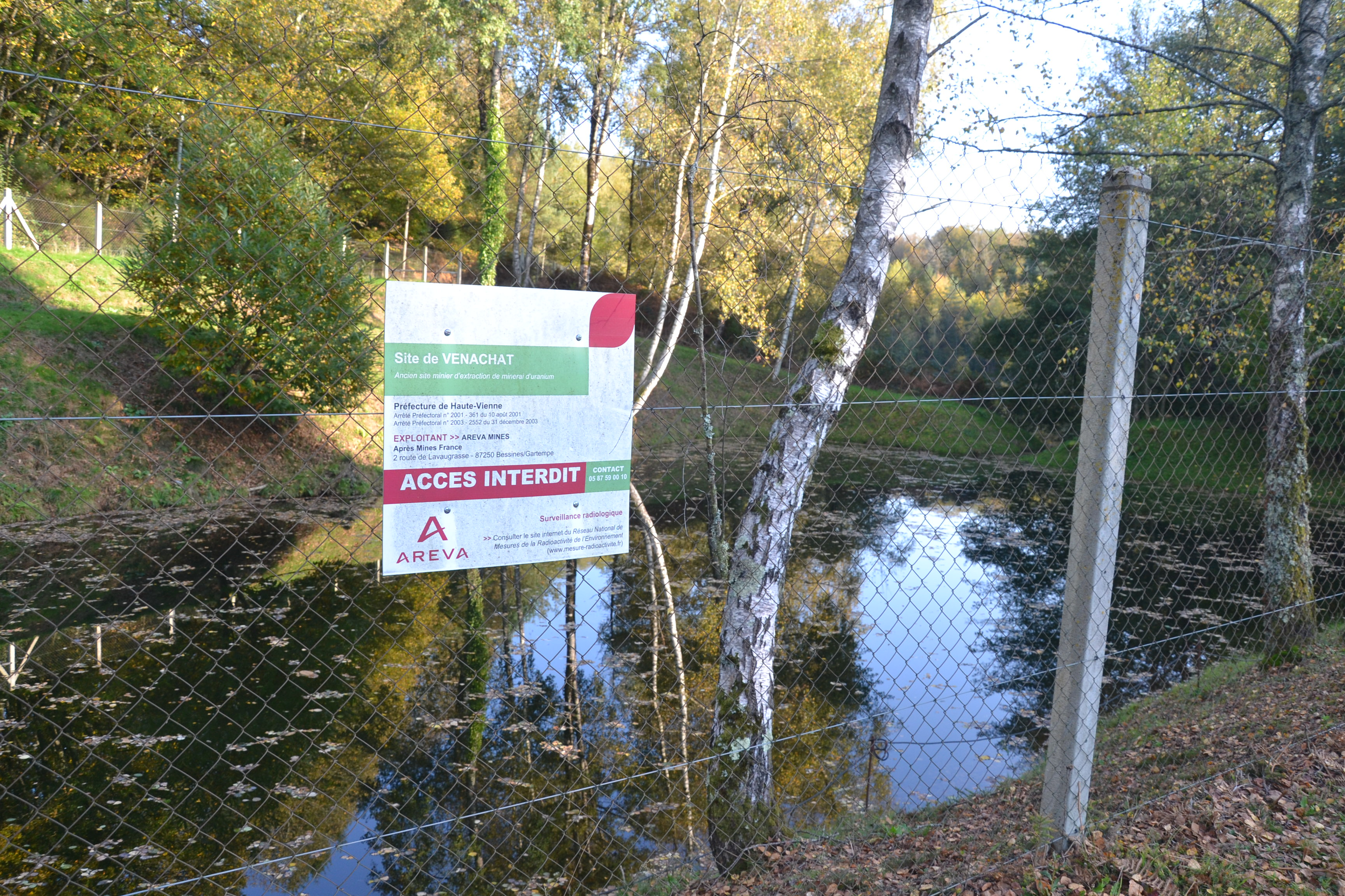 Ancienne mine d'uranium de Vénachat (commune de Compreignac, Haute-Vienne, France).